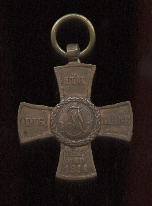 Königreich Bayern, Militärdenkzeichen 1813-1814, Vorderseite